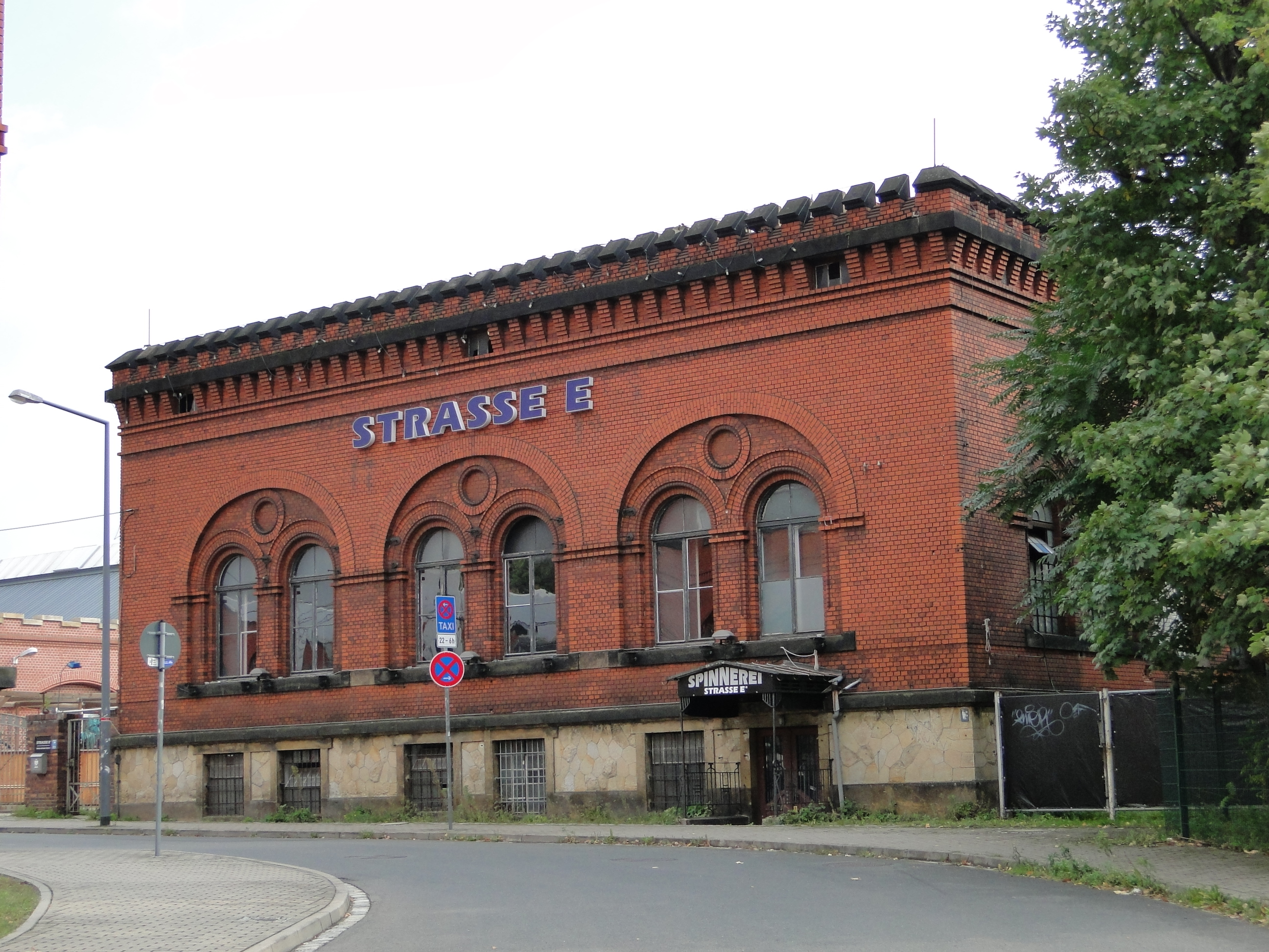 Kulturdenkmal Werner-Hartmann-Straße 2 Dresden